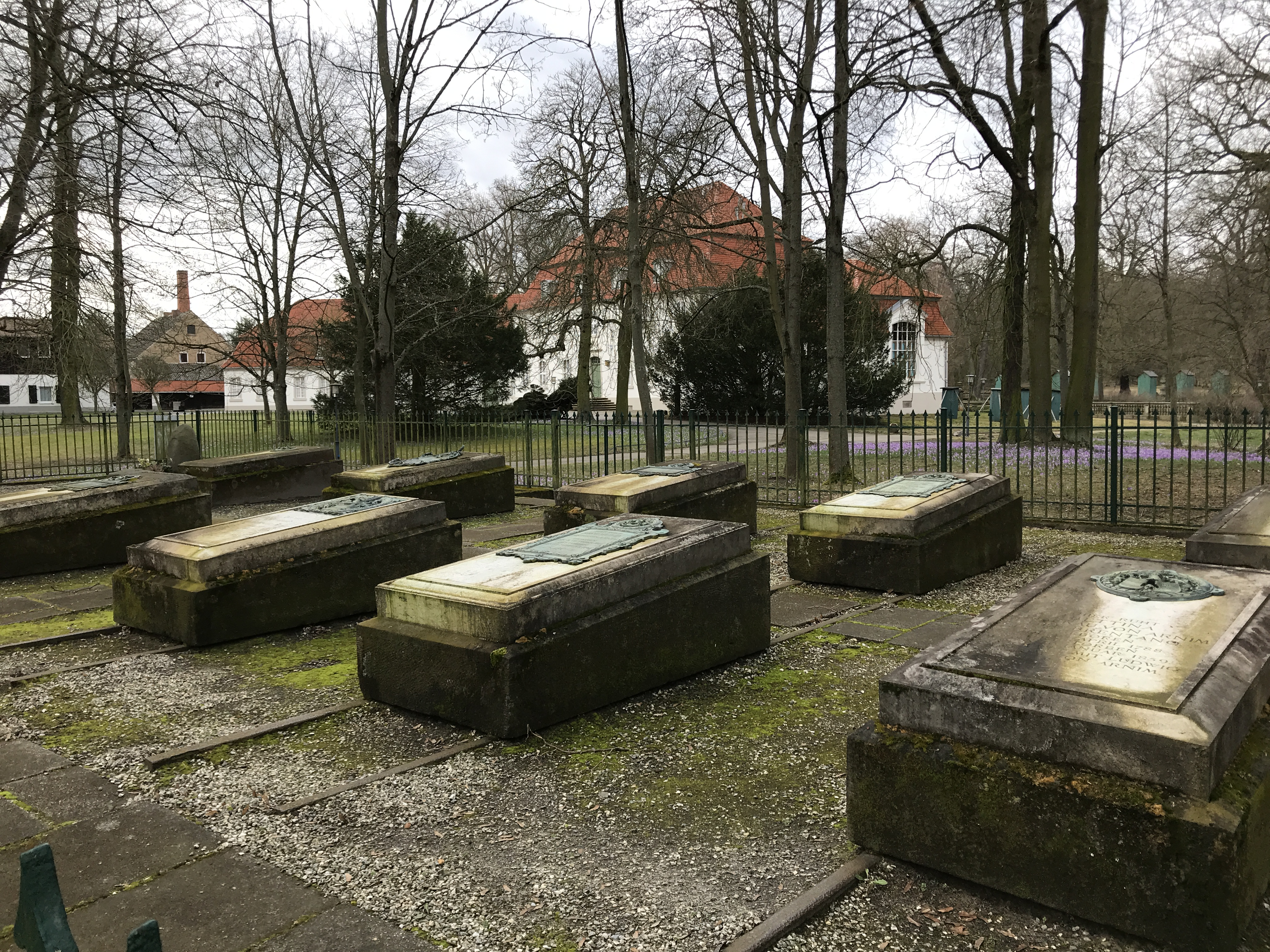 Die Dorfkirche Wiepersdorf geht in ihrem Kern auf einen mittelalterlichen Feldsteinbau zurück und ist Bestandteil des Schlosses Wiepersdorf